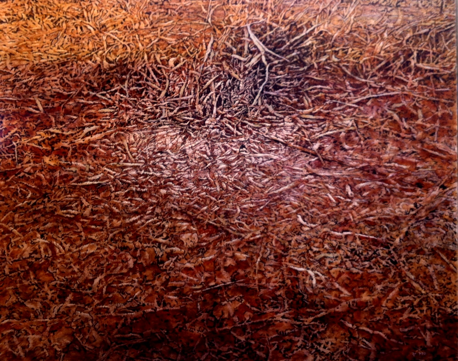 מסדרת הפרדסים